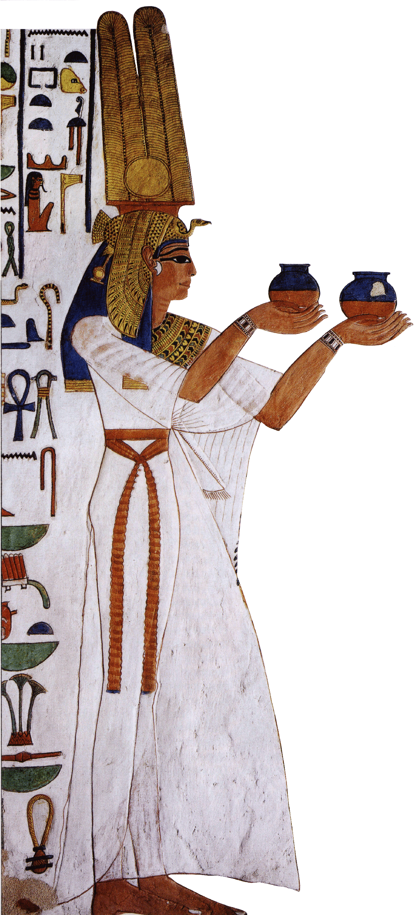 Représentation de Néfertari présentant des offrandes sur la paroi de son tombeau.